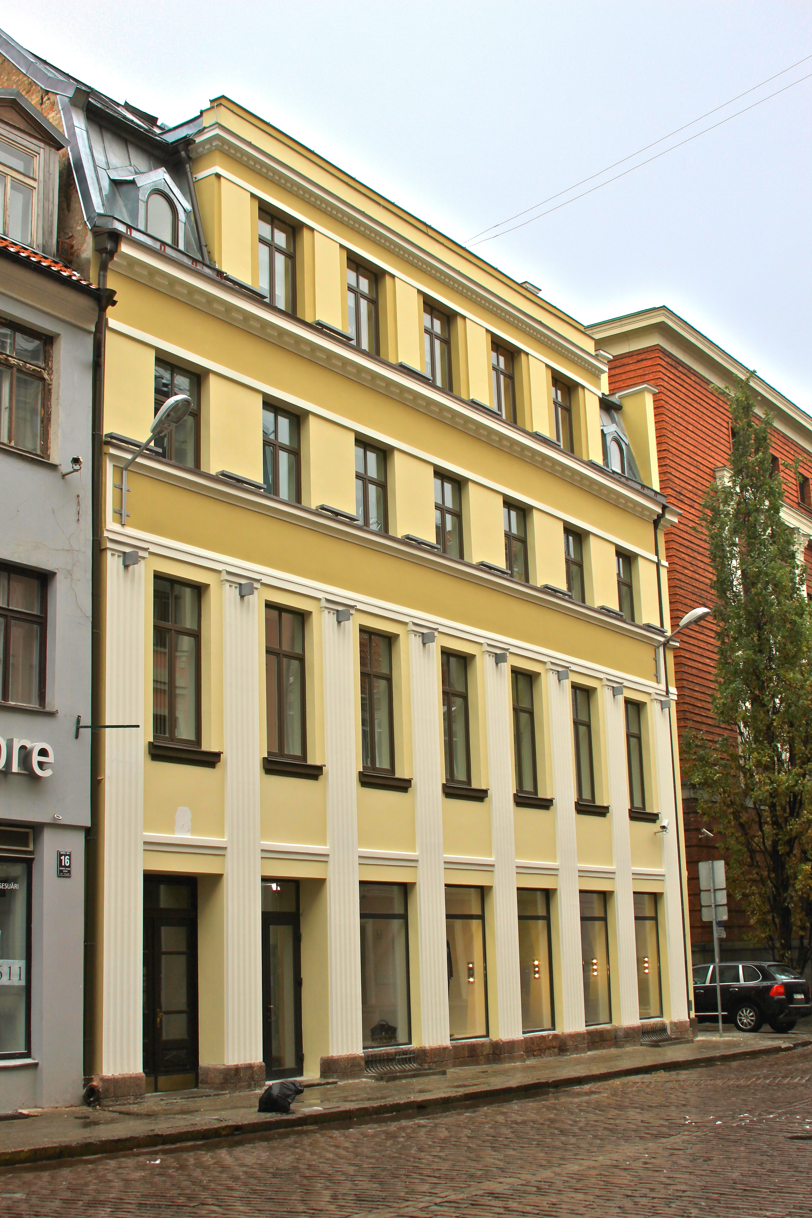 Фото здания на улице Смилшу, 18 в Риге